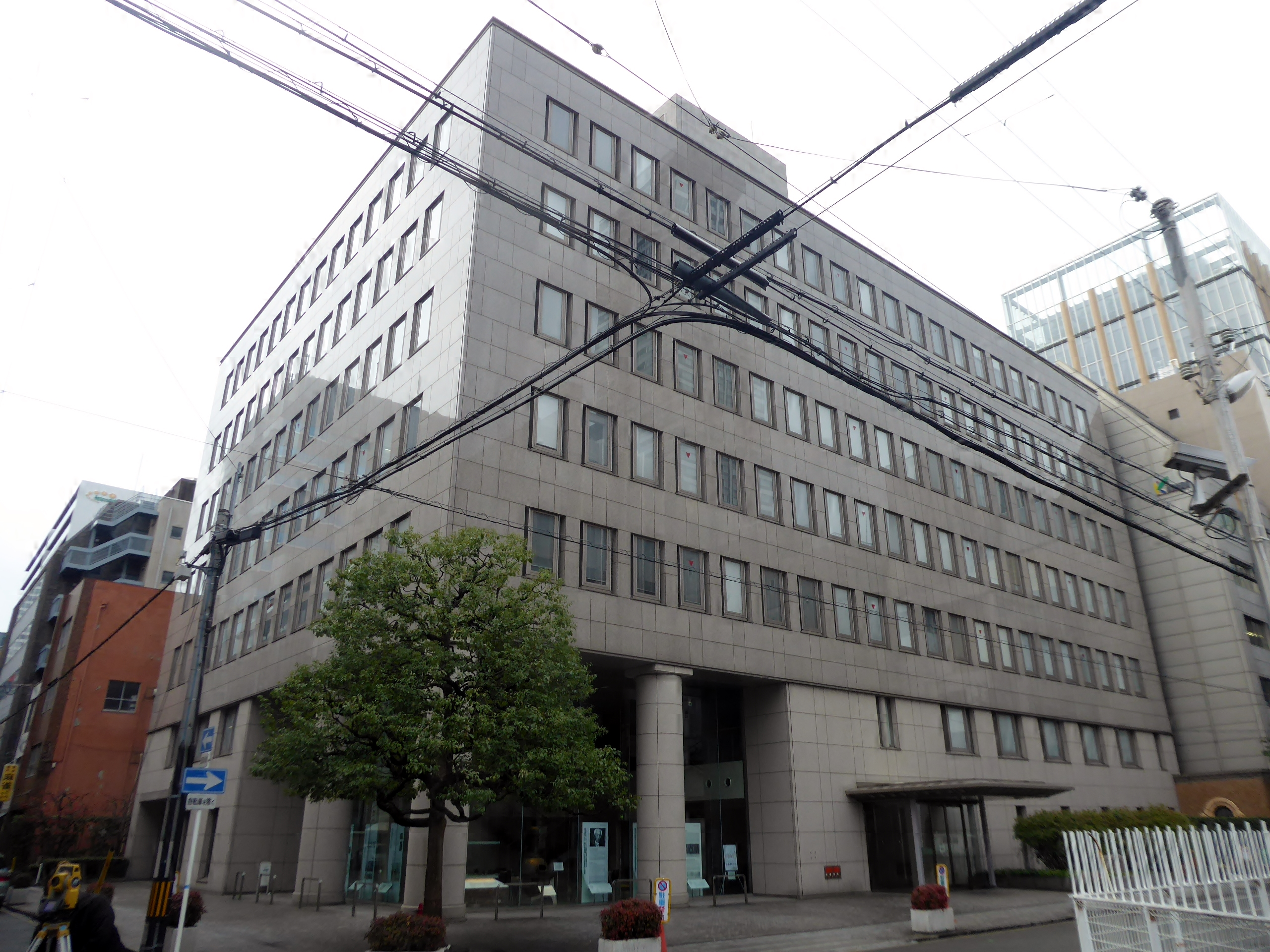 大日本住友製薬株式会社本社を撮影。 Panasonic Lumix DMC-TZ60